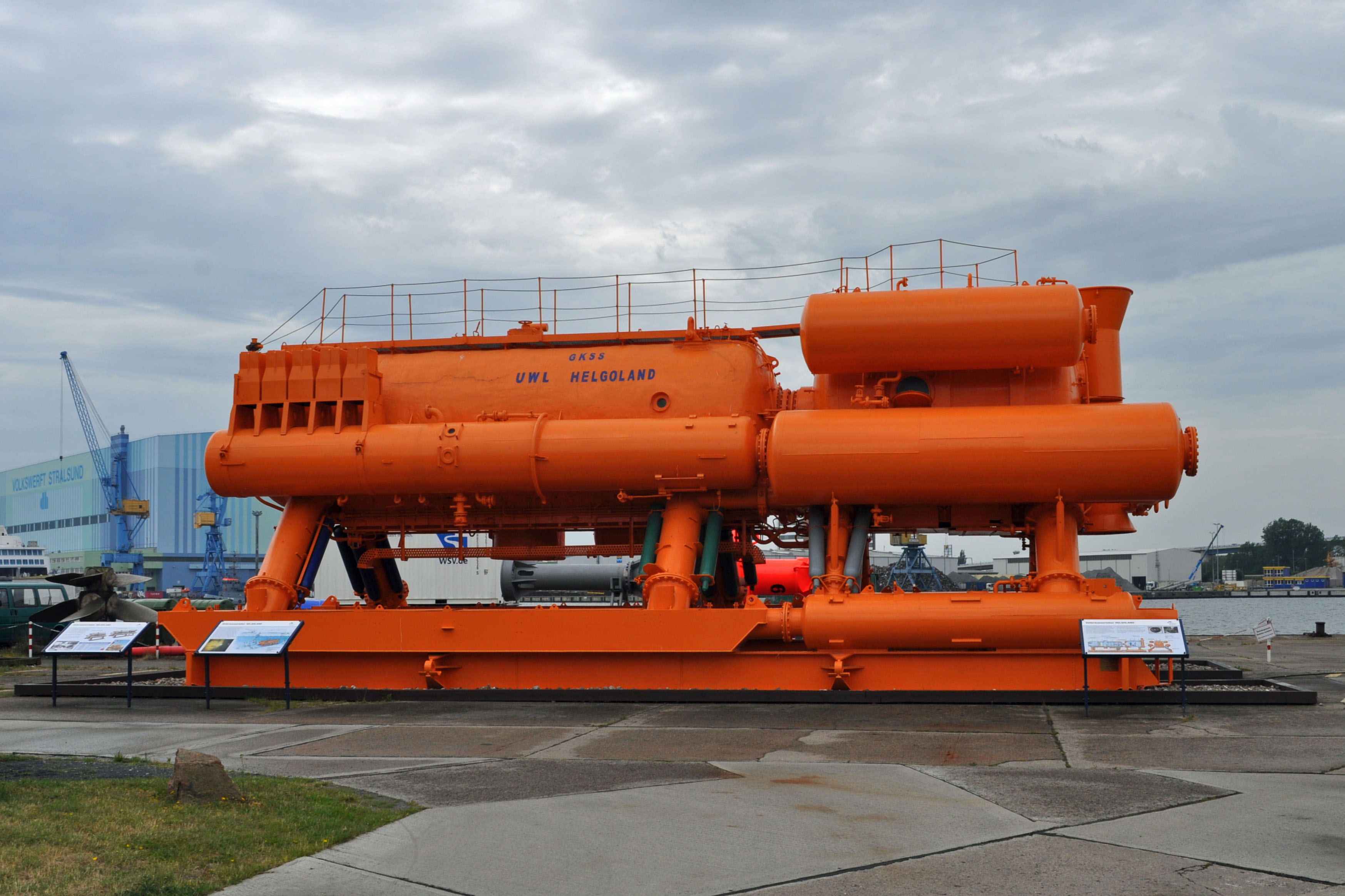 Exponat bzw. Gebäude im Nautineum Stralsund auf dem Dänholm, Stralsund.